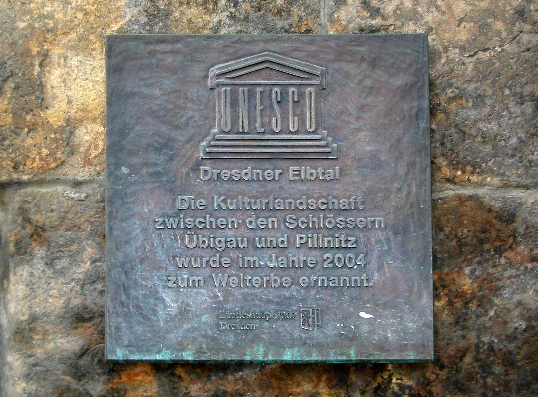 Gedenktafel Weltkulturerbe Dresdner Elbtal